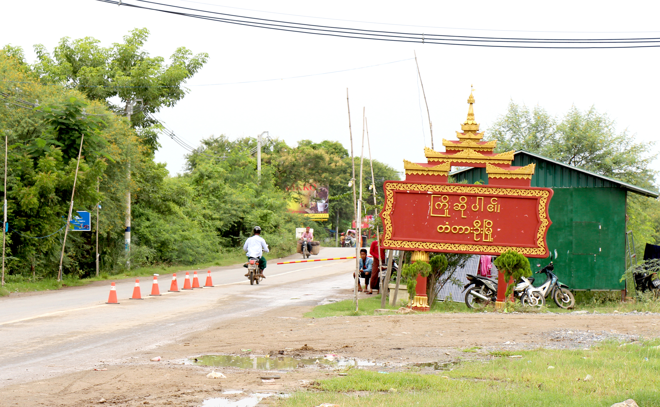 မြန်မာဘာသာ: တံတားဦးမြို့